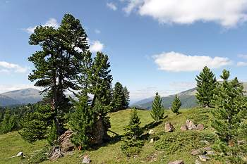 Zirben (Swiss Pines, Pinus cembra), Turracher Höhe